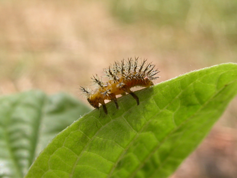 Epilachna argus